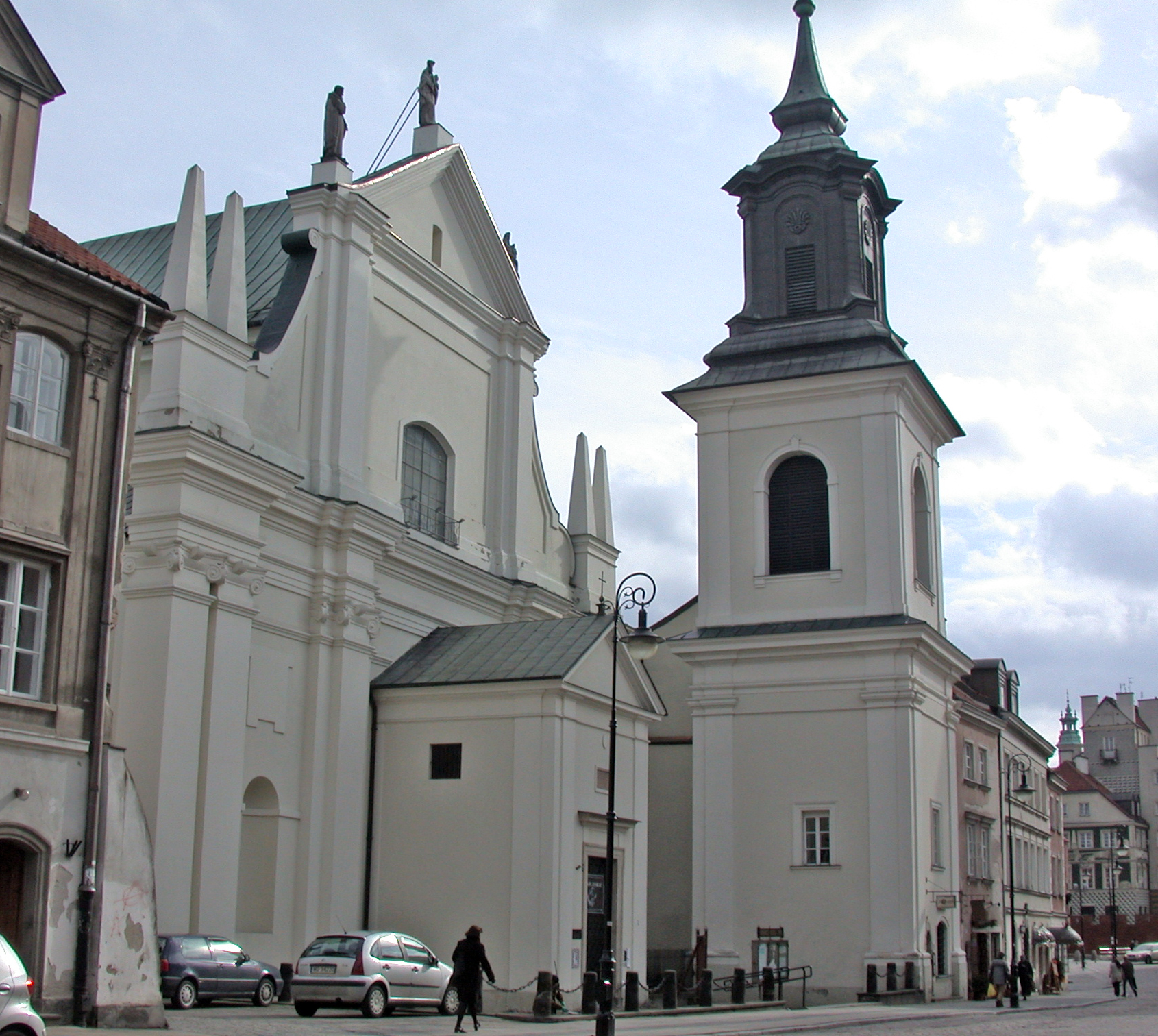 Varsavia, chiesa di San Giacomo (kóściół Św. Jacka), nella Città Nuova (Nowego Miasta), sulla via Freta.